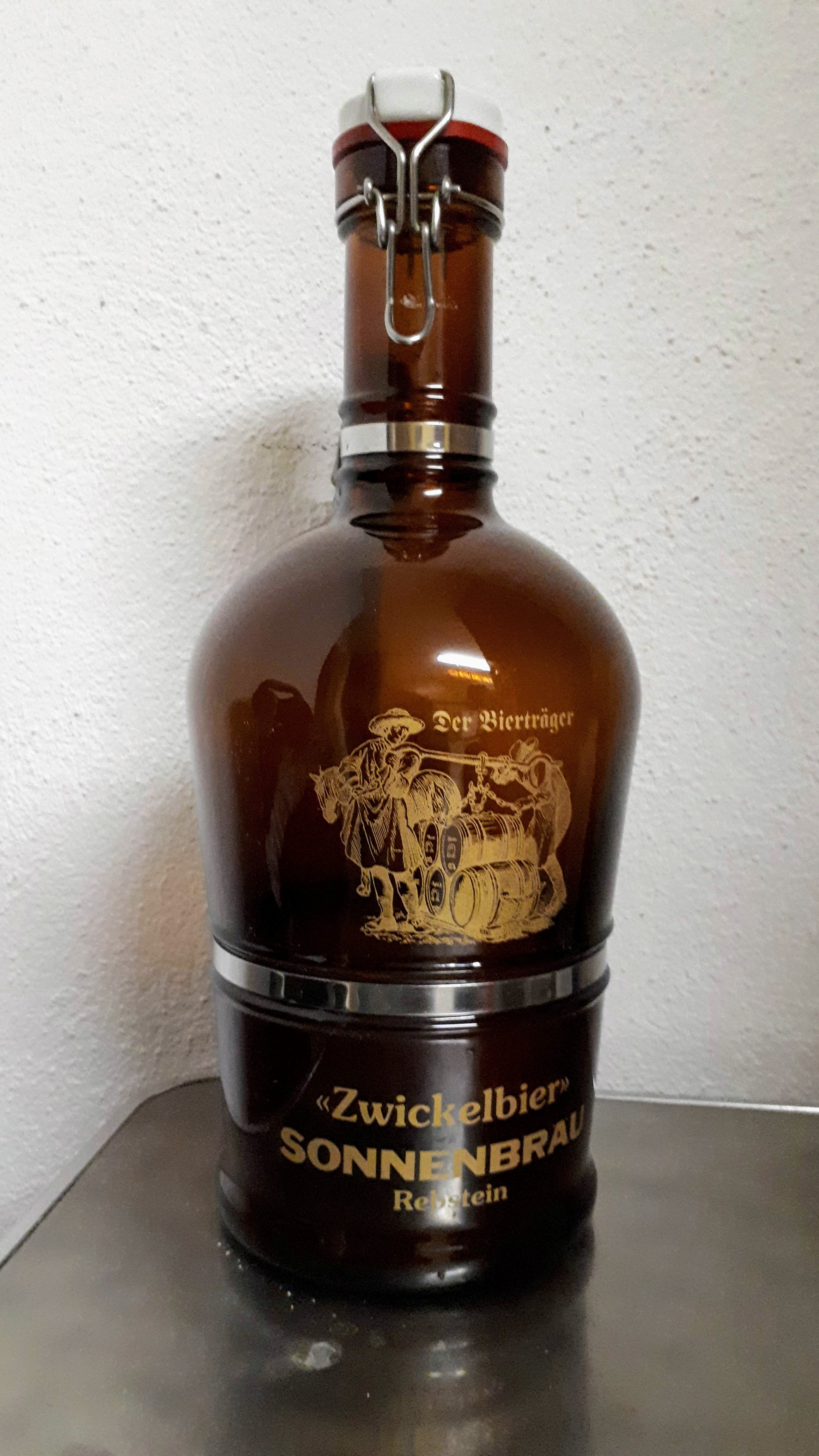 Eine antike Bierflasche der Sonnebräu AG Brauerei in Rebstein. Darin abgefüllt war Zwickelbier.